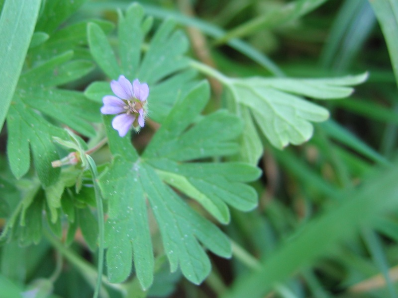 Kleiner Storchschnabel Geranium pusillum